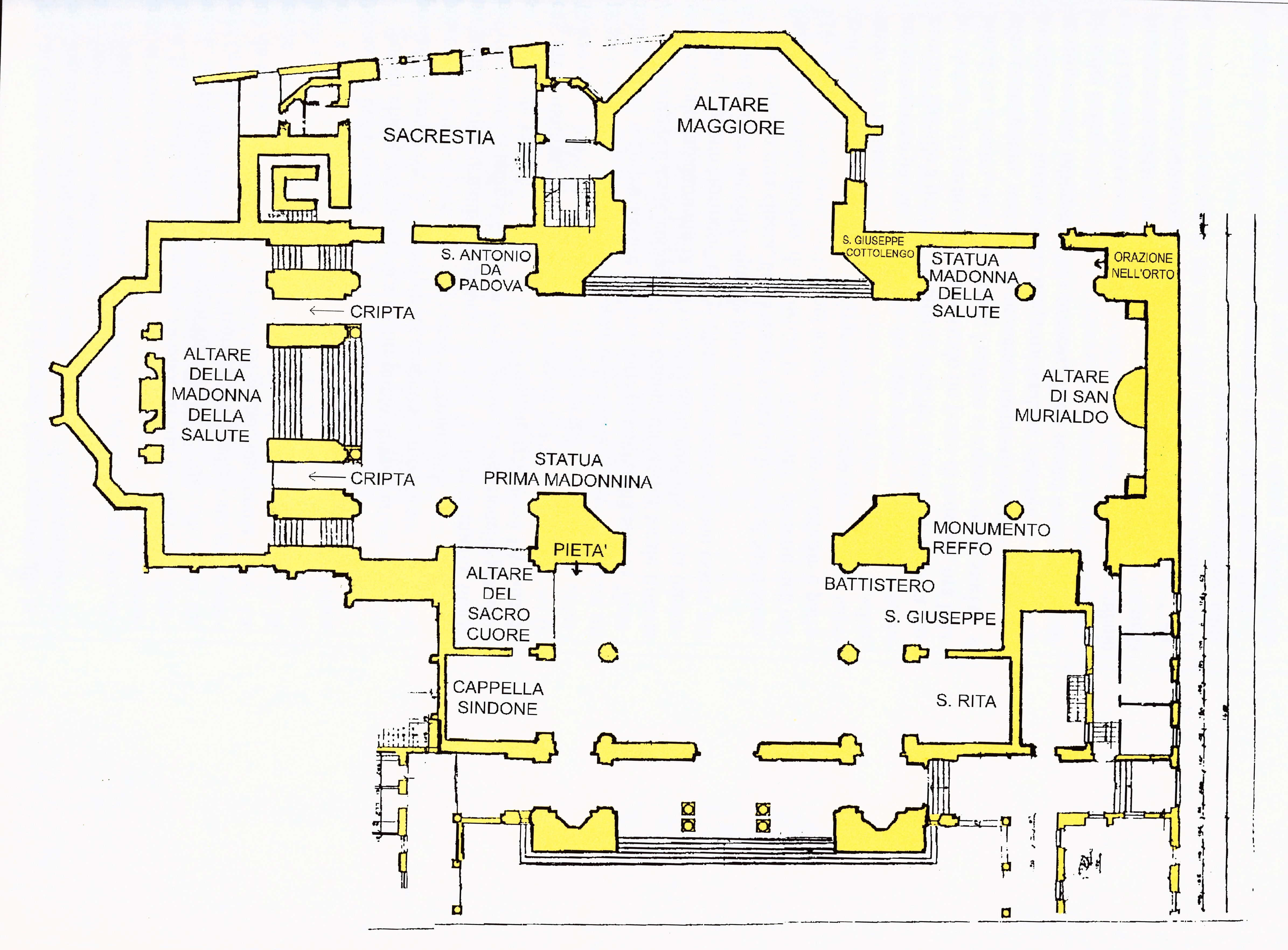 Pianta della Chiesa della Salute in Torino